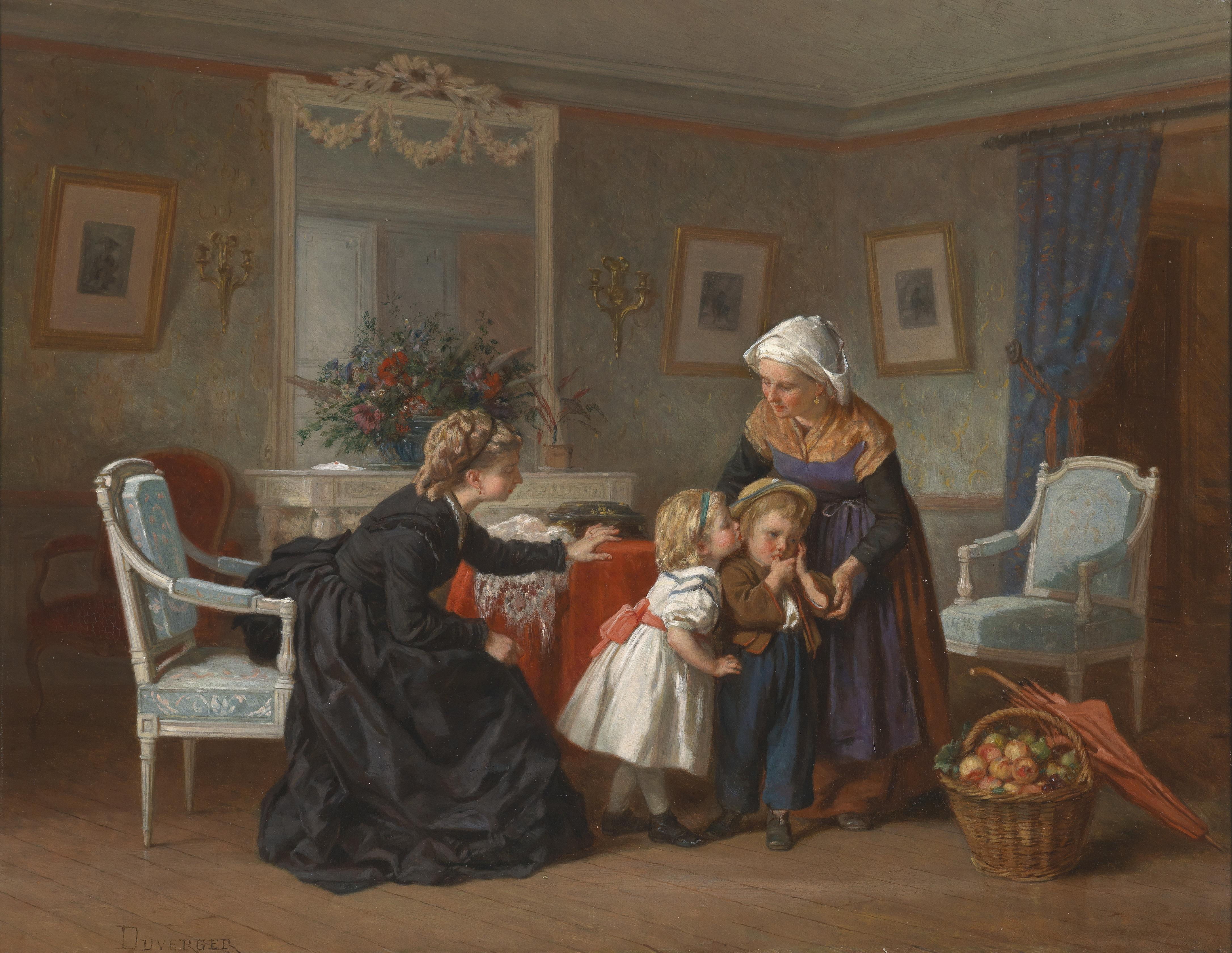 Besuch vom Lande, signiert Duverger, Öl auf Holz, 37 x 46 cm